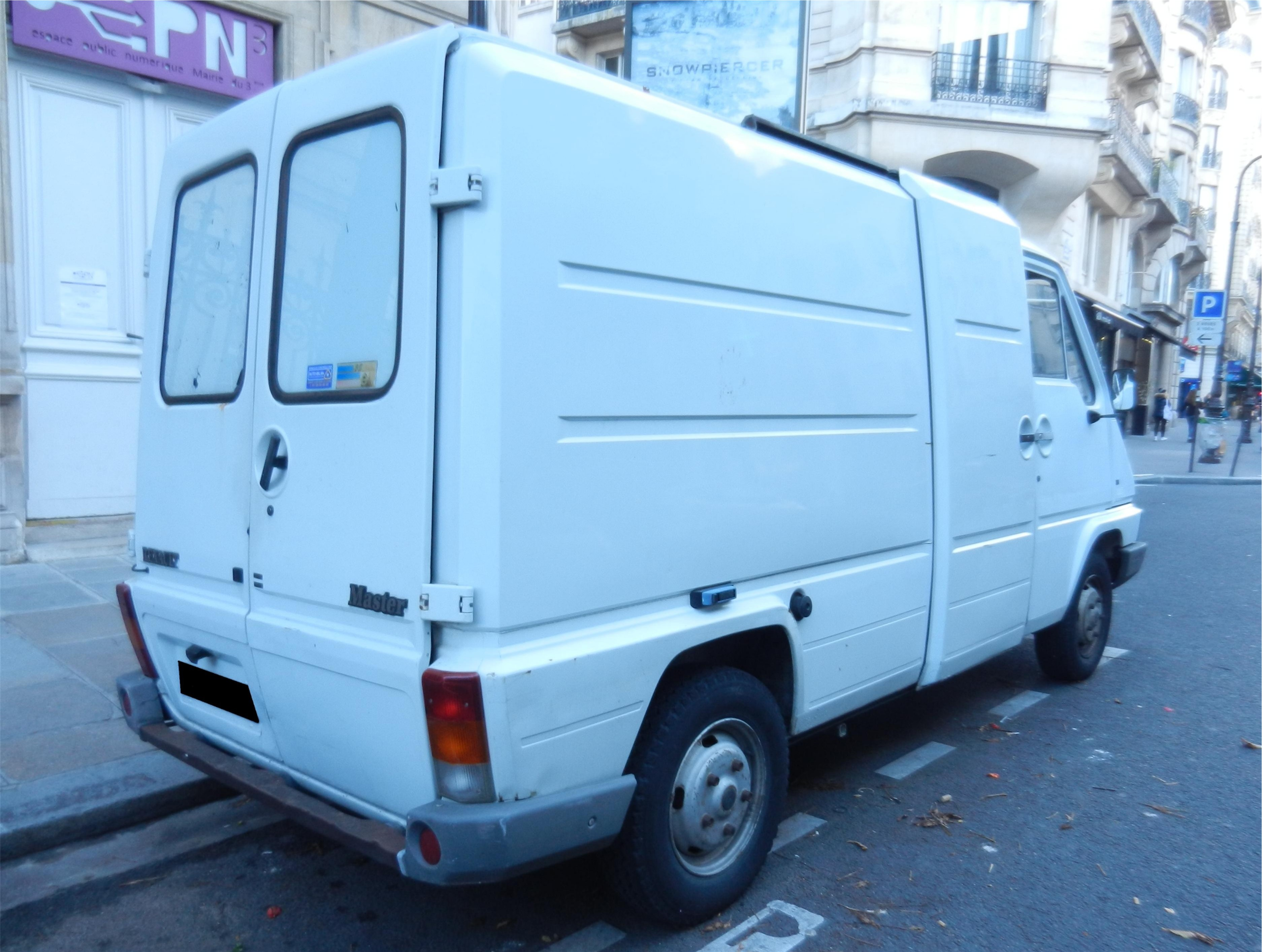 Renault Master I fourgon, vue arrière